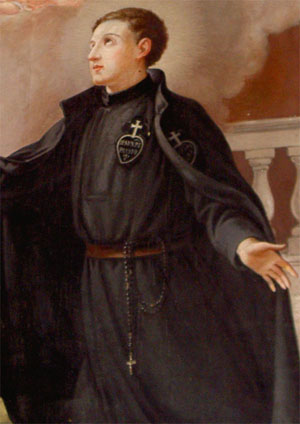 Gabriel of Our Lady of Sorrows photo d'une peinture de Gabriel de l'Addolorata, par N. Diotallevi (peintre).